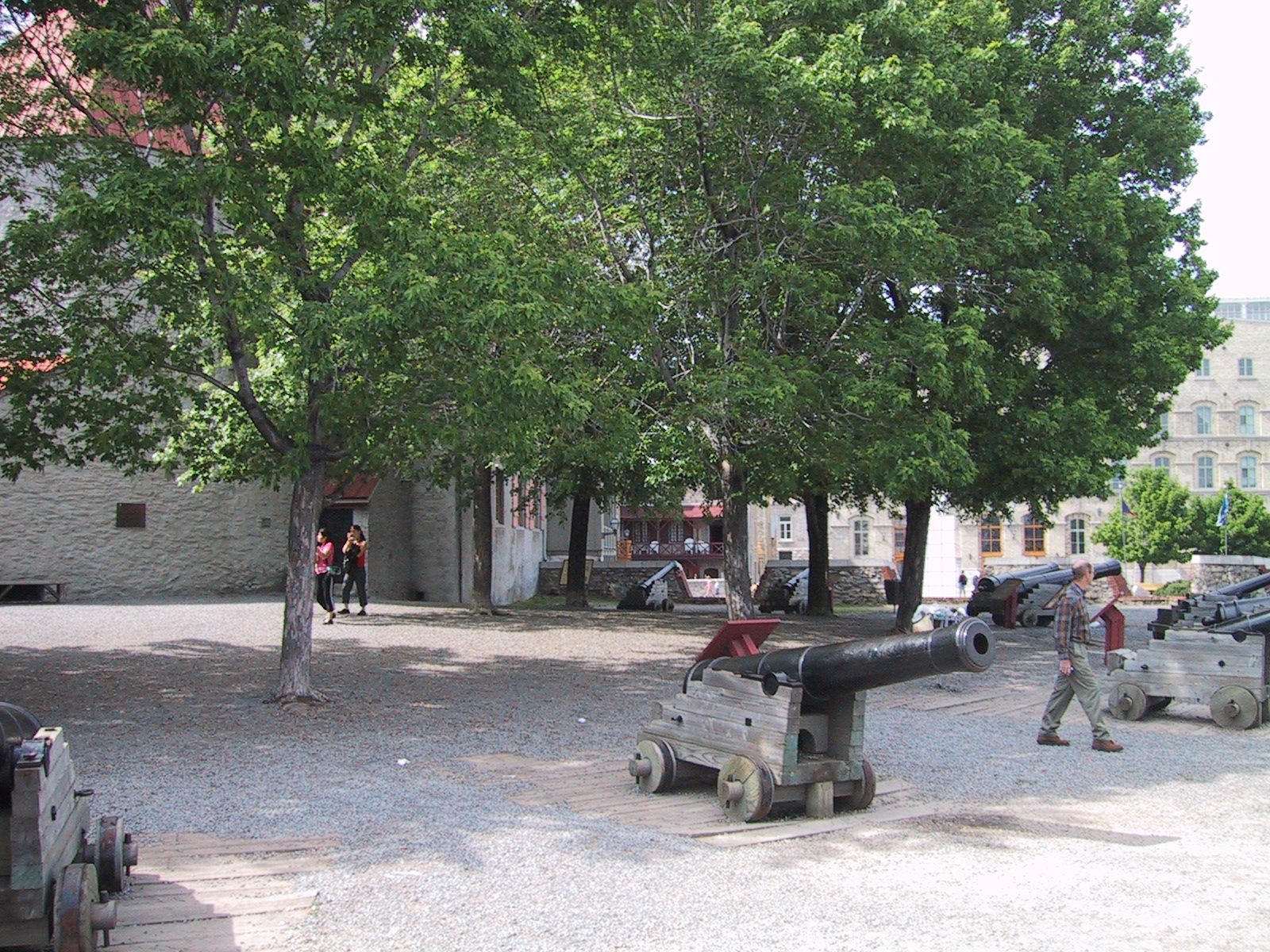 Batterie Royale dans le Vieux-Québec, Québec, Canada